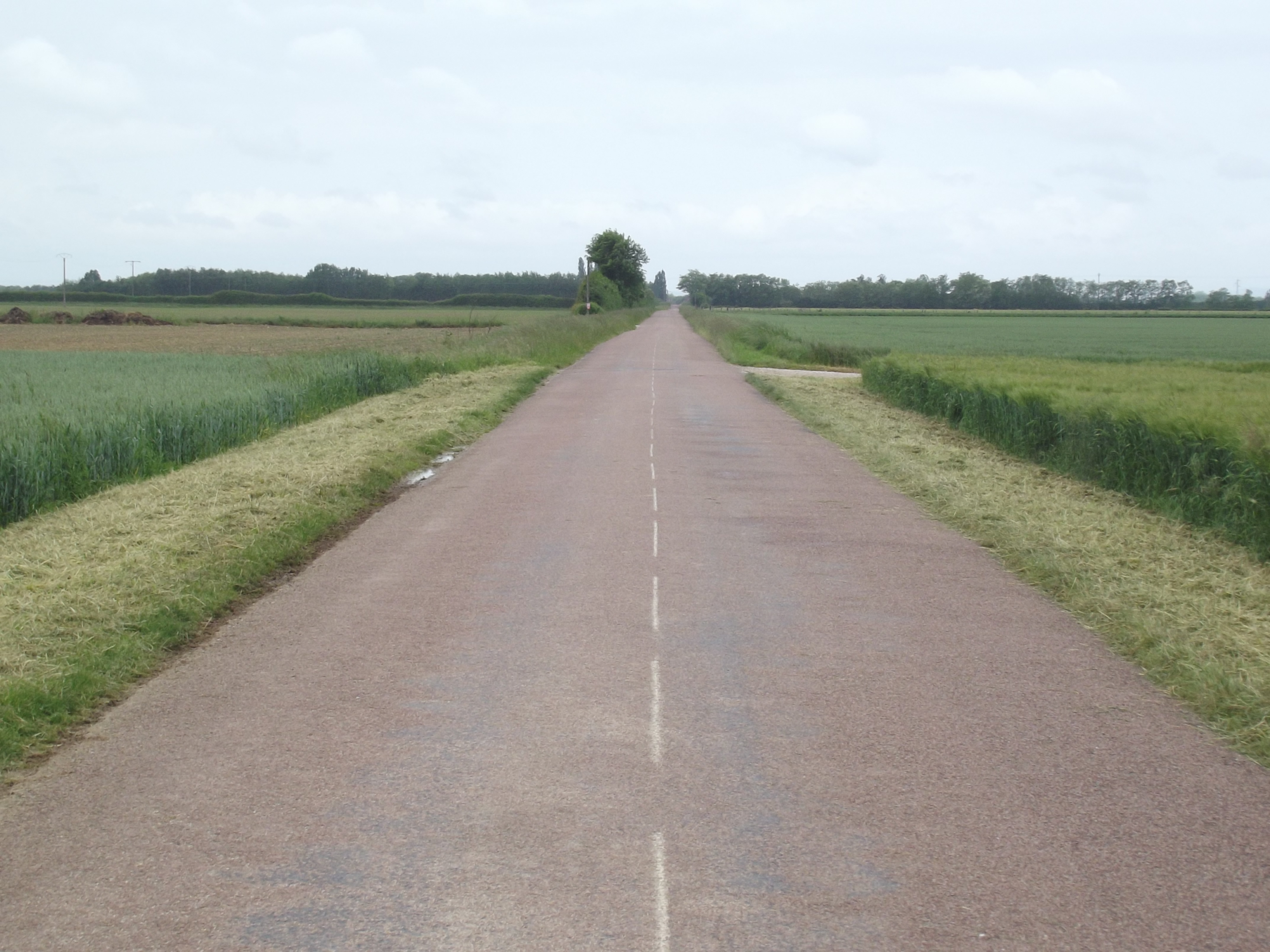 Teilstück der ehemaligen Römerstraße Chalon-Besançon. Teilstück von Clux Richtung Mont-lès-Seurre